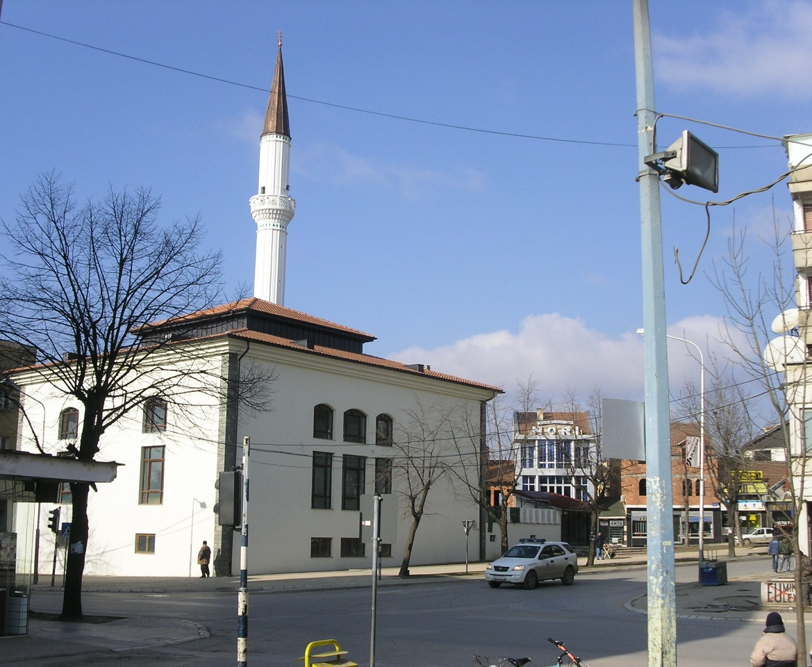 Xhamia e Madhe